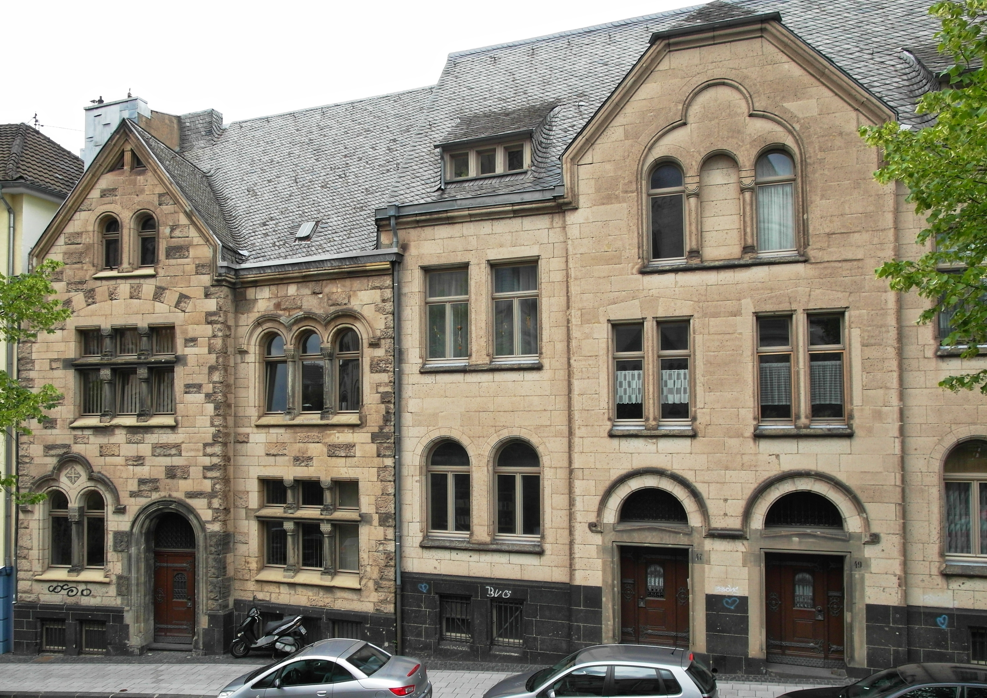 Pfarrhaus und ehemalige Kaplanei der Herz-Jesu-Kirche in Aachen-Burtscheid. Beide im neoromanischen Stil von Joseph Kleesattel erbaut.